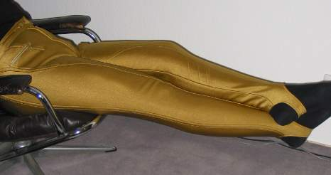 stirrup pants